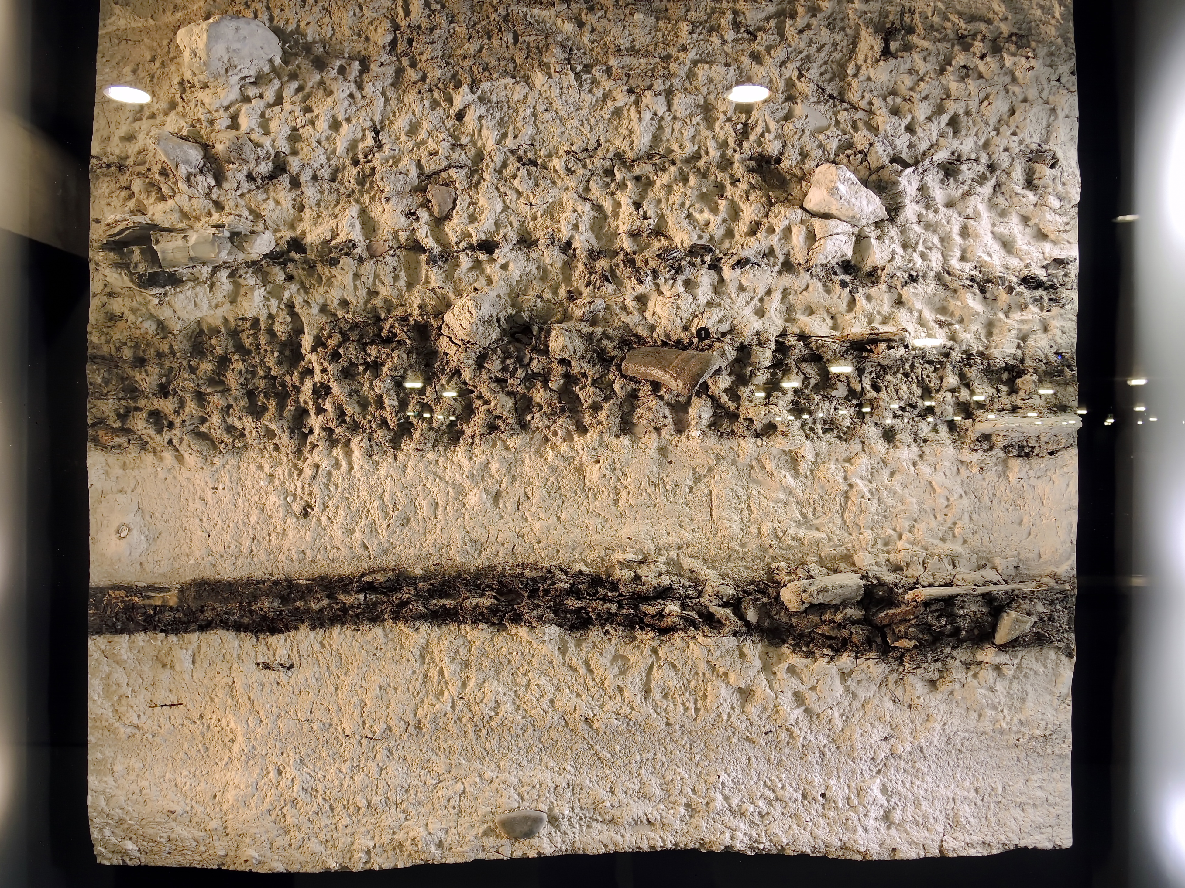 Ausstellung Archäologie im Parkhaus Opèra, Exponat aus der Grabung Parkhaus Opéra in Zürich (Switzerland) : Originalschichten aus der Rettungsgrabung 'Parkhaus Opéra' von 2010 mit Kulturschichten (dunkel) und Seeablagerungen aus Seekreide (hell) als 'Zwischenfutter' des Hirschgeweih-Steinbeils